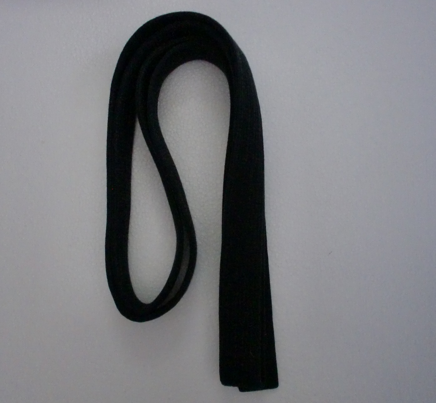 空手道における黒帯の例（写真の帯は少林寺流空手道錬心舘における黒帯、作成者が使用しているものを撮影）。 注：黒帯には名前と流派名が刺しゅうされているがプライバシー保護のために刺しゅうされている面を裏向きにして撮影している。